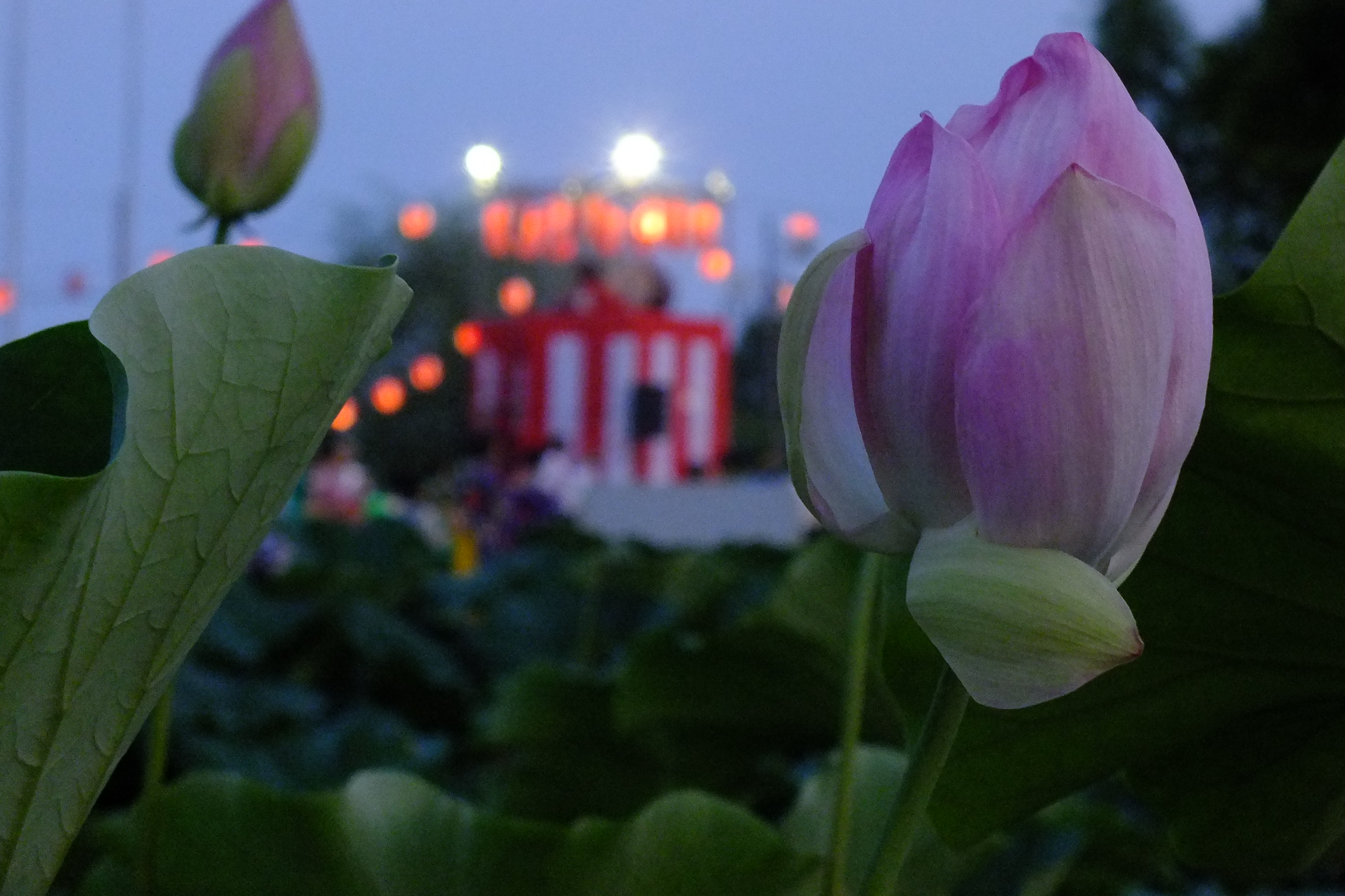 Hiraike-park (平池公園 大賀ハス)兵庫県加東市東古瀬 第35回 平池公園夏のフェスティバル 花火大会 2017年07月15日 （土曜日）第35回 平池公園夏のフェスティバル 花火大会 2017年07月15日 （土曜日）